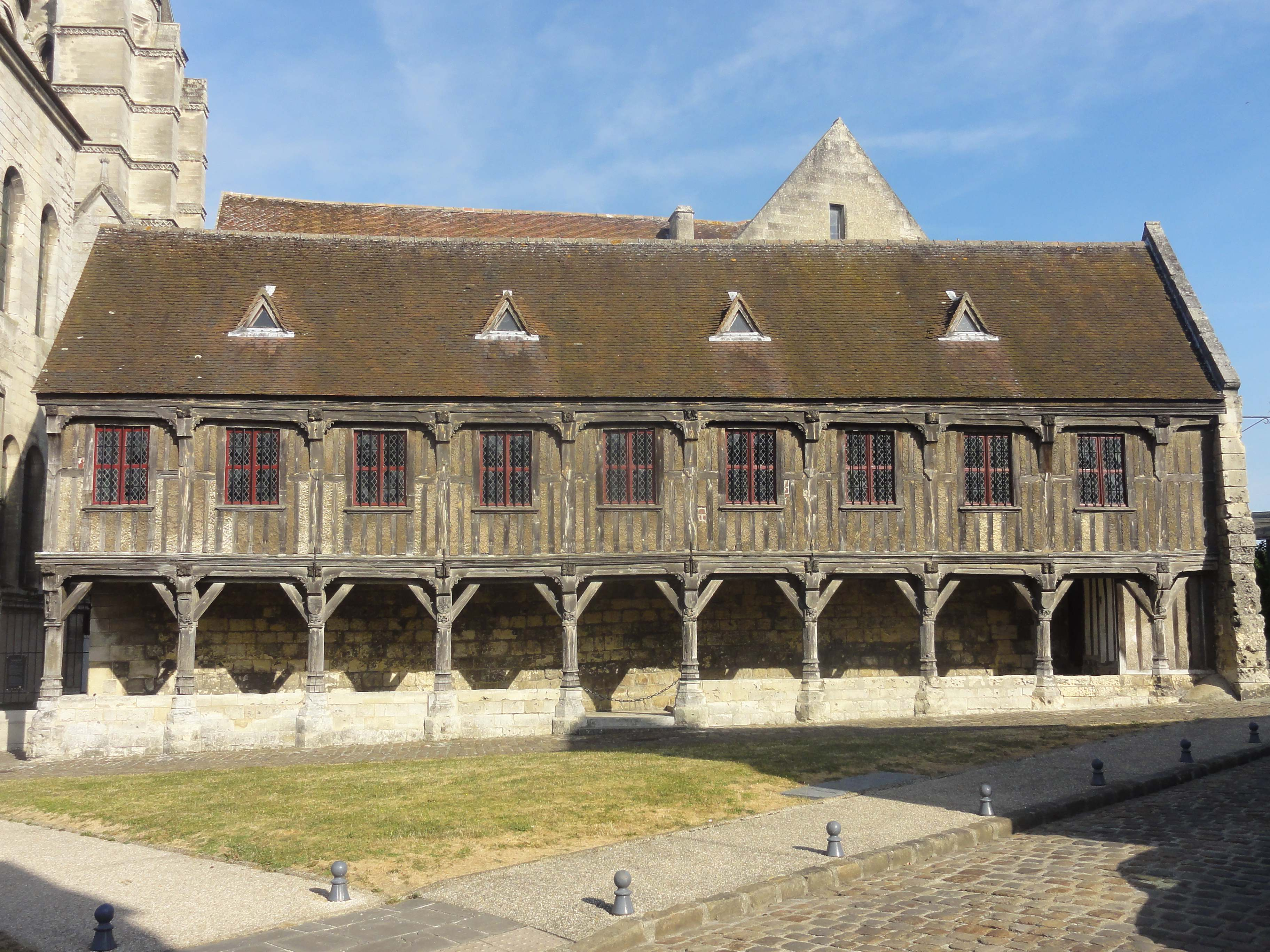 Cathédrale Notre-Dame, bibliothèque du chapitre - voir le titre du fichier.